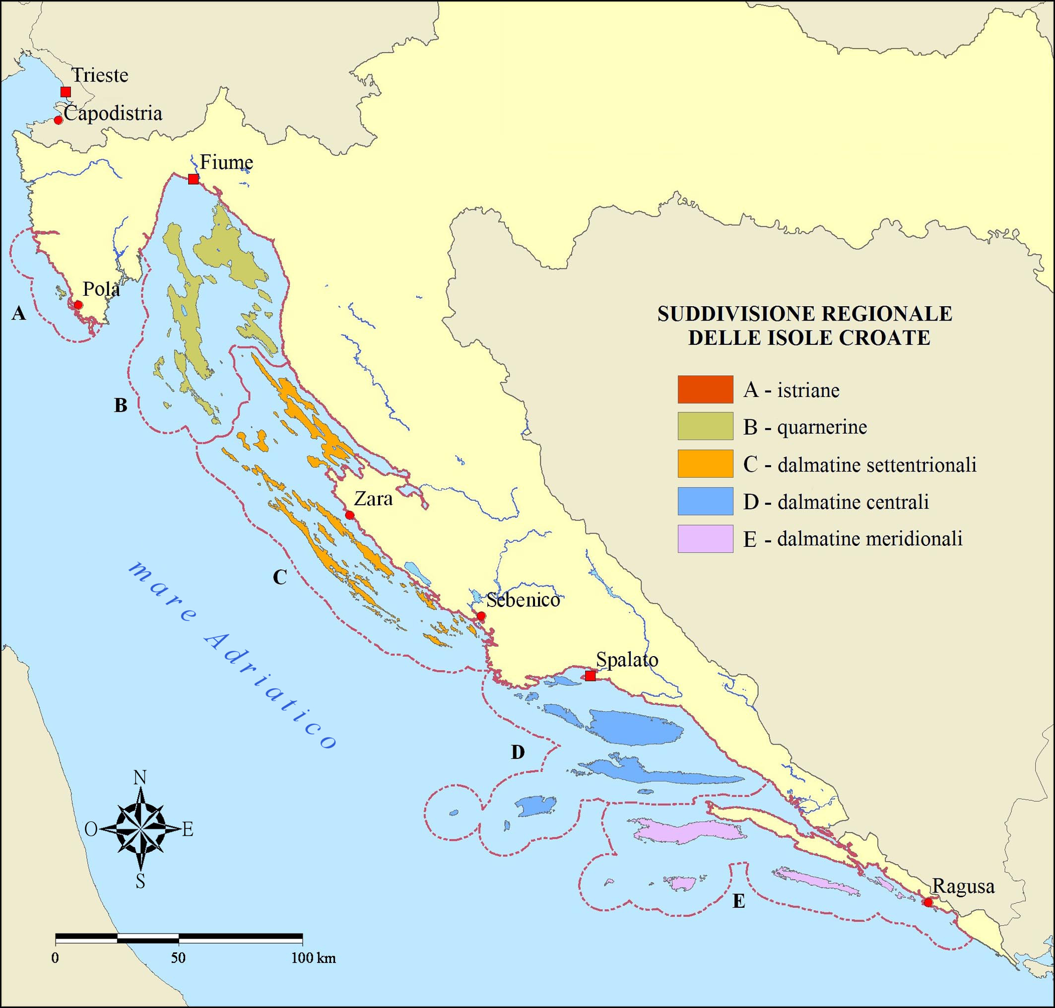 Suddivisione regionale delle isole croate